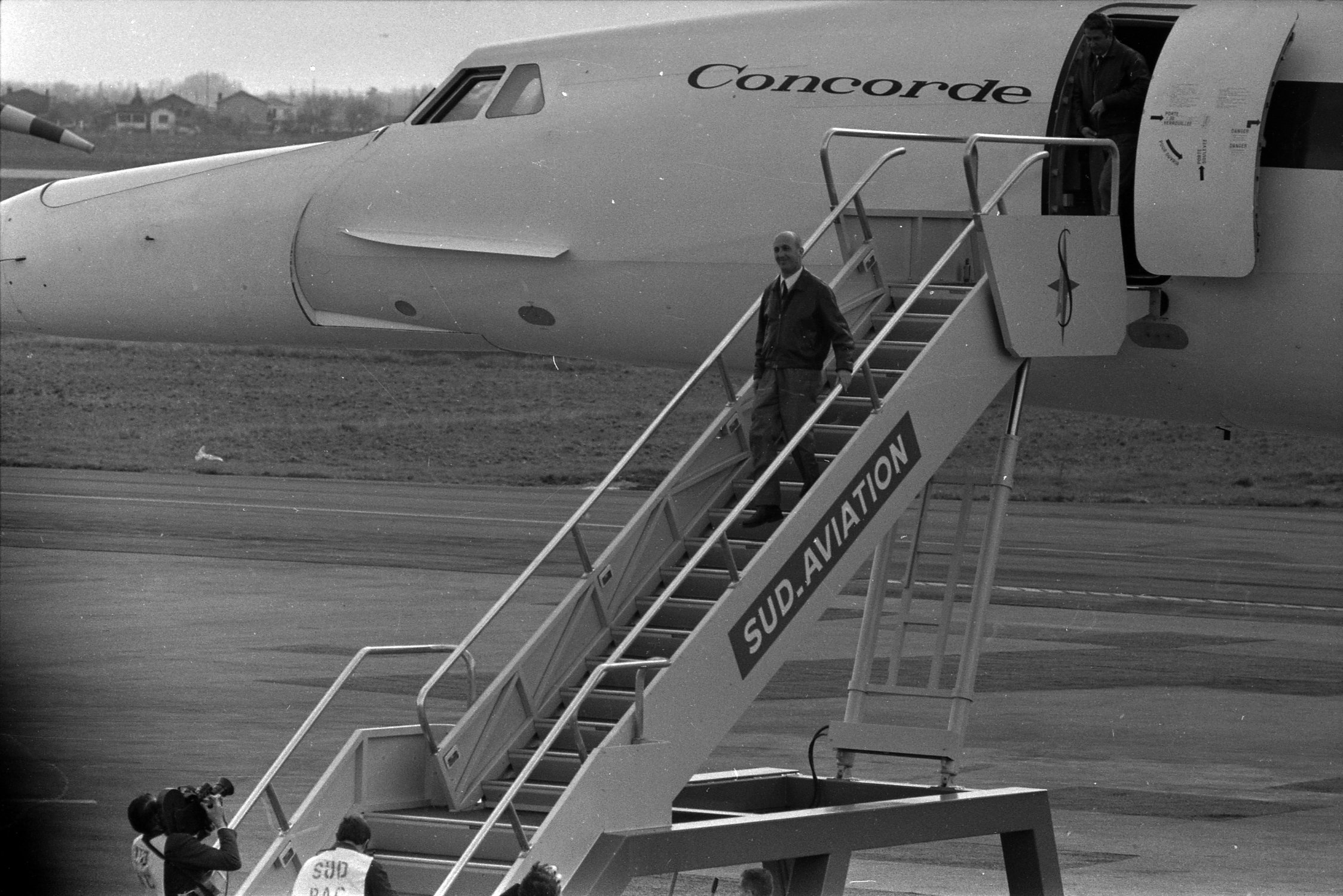 Aérogare Blagnac 1. 2 mars 1969. Vue d'ensemble d'André Turcat (directeur des essais en vol de Sud Aviation et pilote du 1er vol d'essai du Concorde) descendant du Concorde sur une passerelle ; en haut de la passerelle Jacques Guignard (autre pilote) s'apprête à descendre ; en bas de la passerelle un caméraman filme. Cliché pris lors du 1er vol d'essai du Concorde.